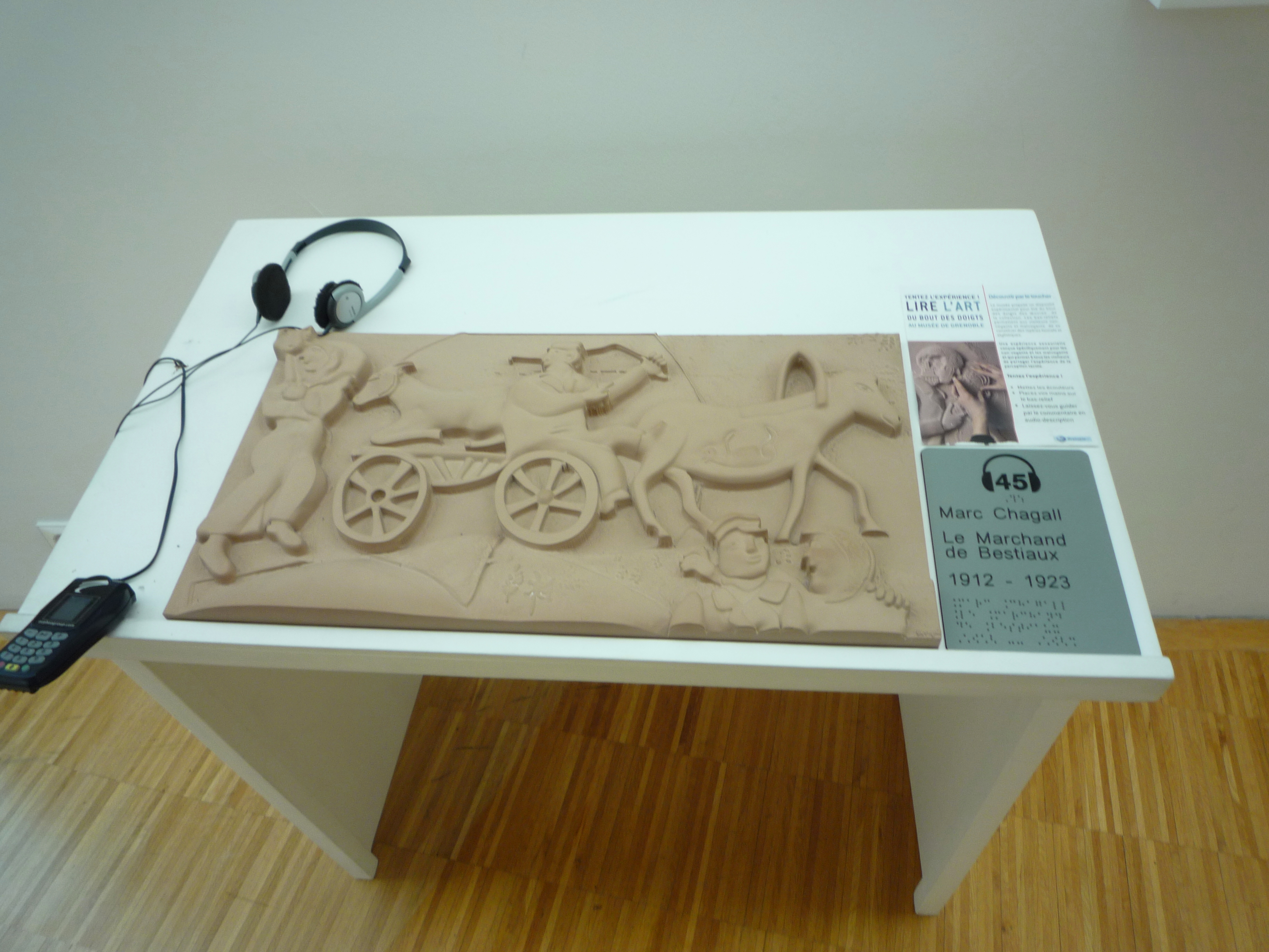 Bas-relief pour non-voyants - Musée de Grenoble.